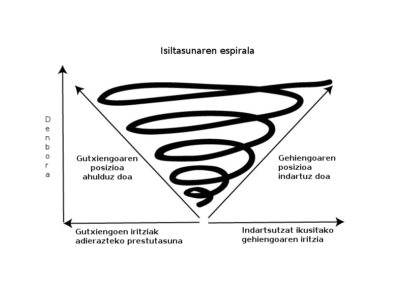 Elisabeth Noelle-Neumann-en Isiltasunare espirala teoriaren irudia